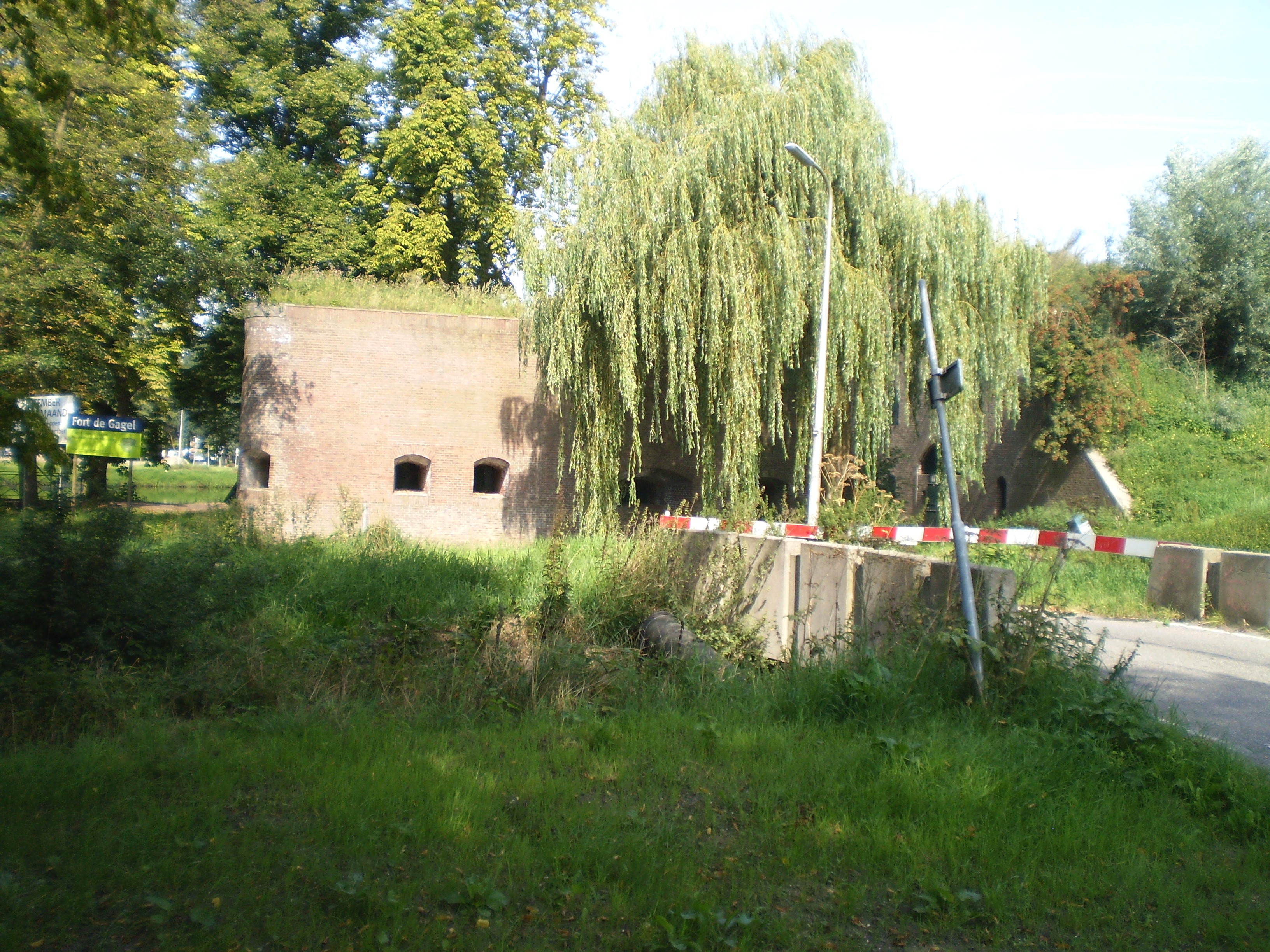 Fort De Gagel.